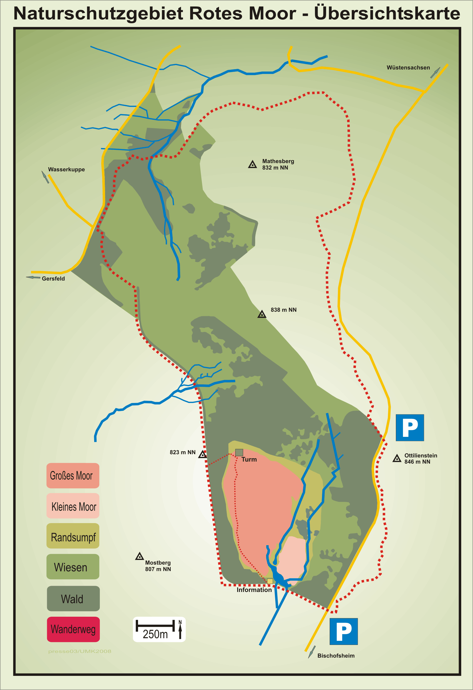 Übersichtskarte Naturschutzgebiet Rotes Moor, Hochrhöhn